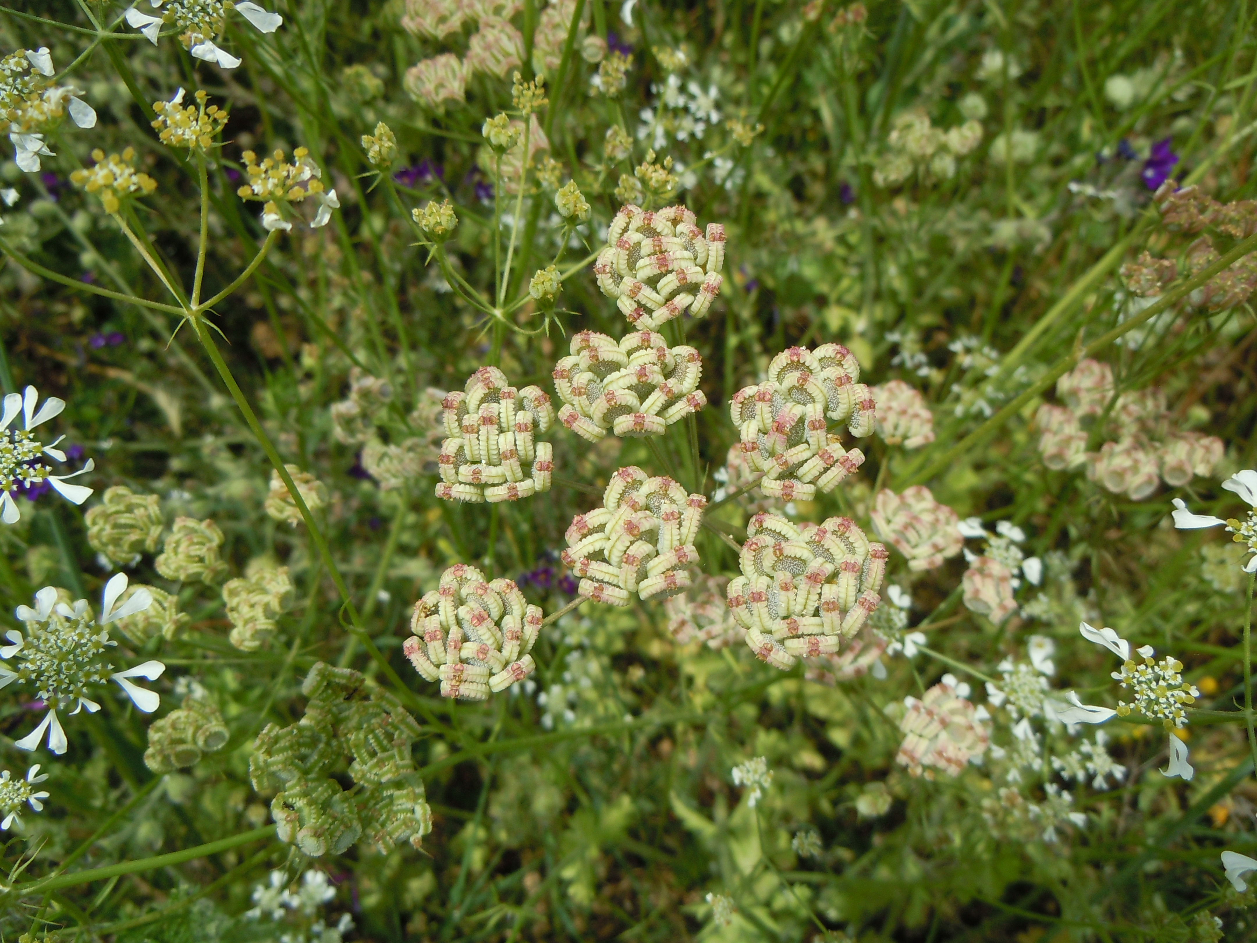 Inflorescence de Tordylium apulum à Epidaure